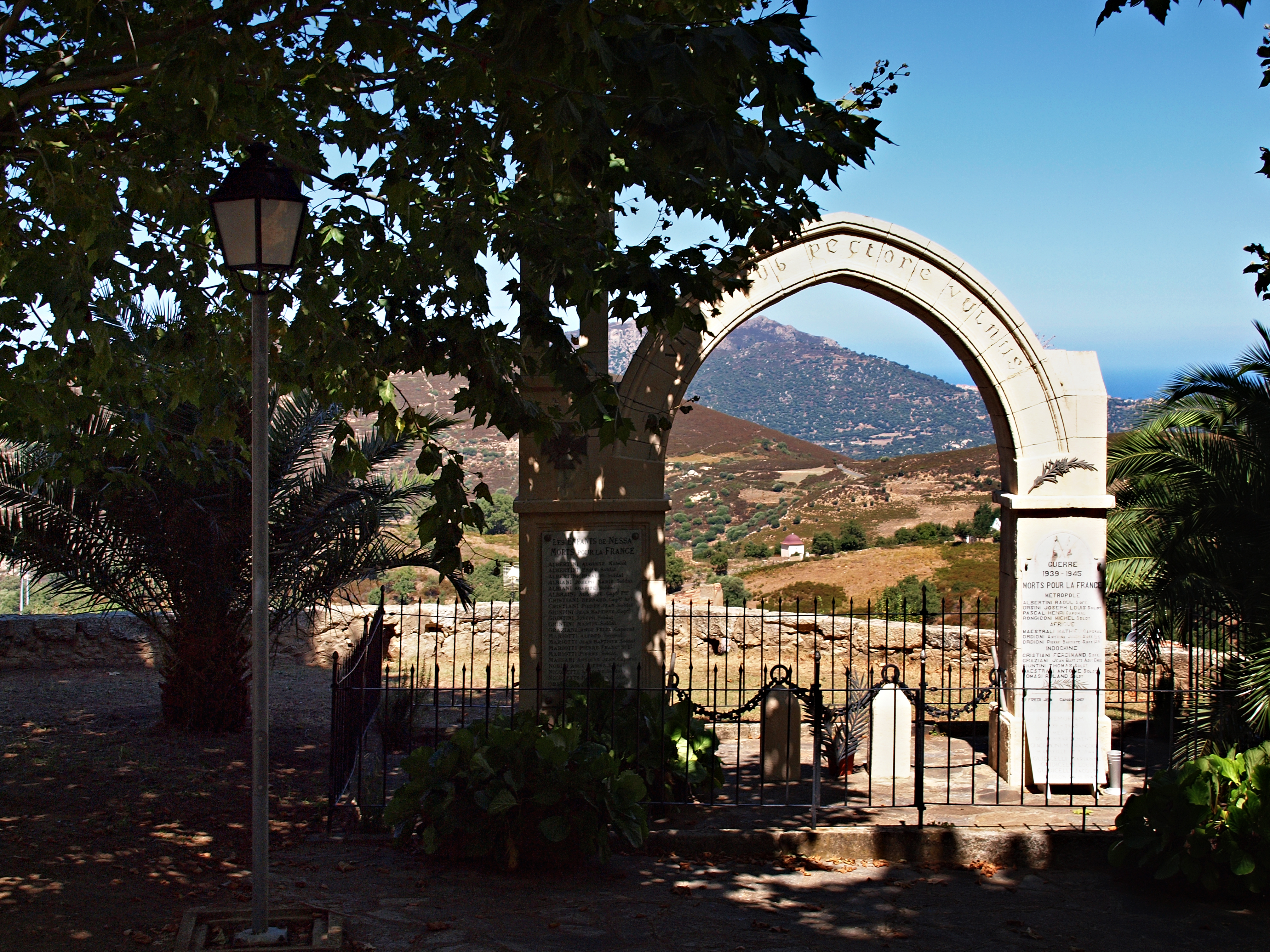 Nessa (Corsica) - Monument aux morts